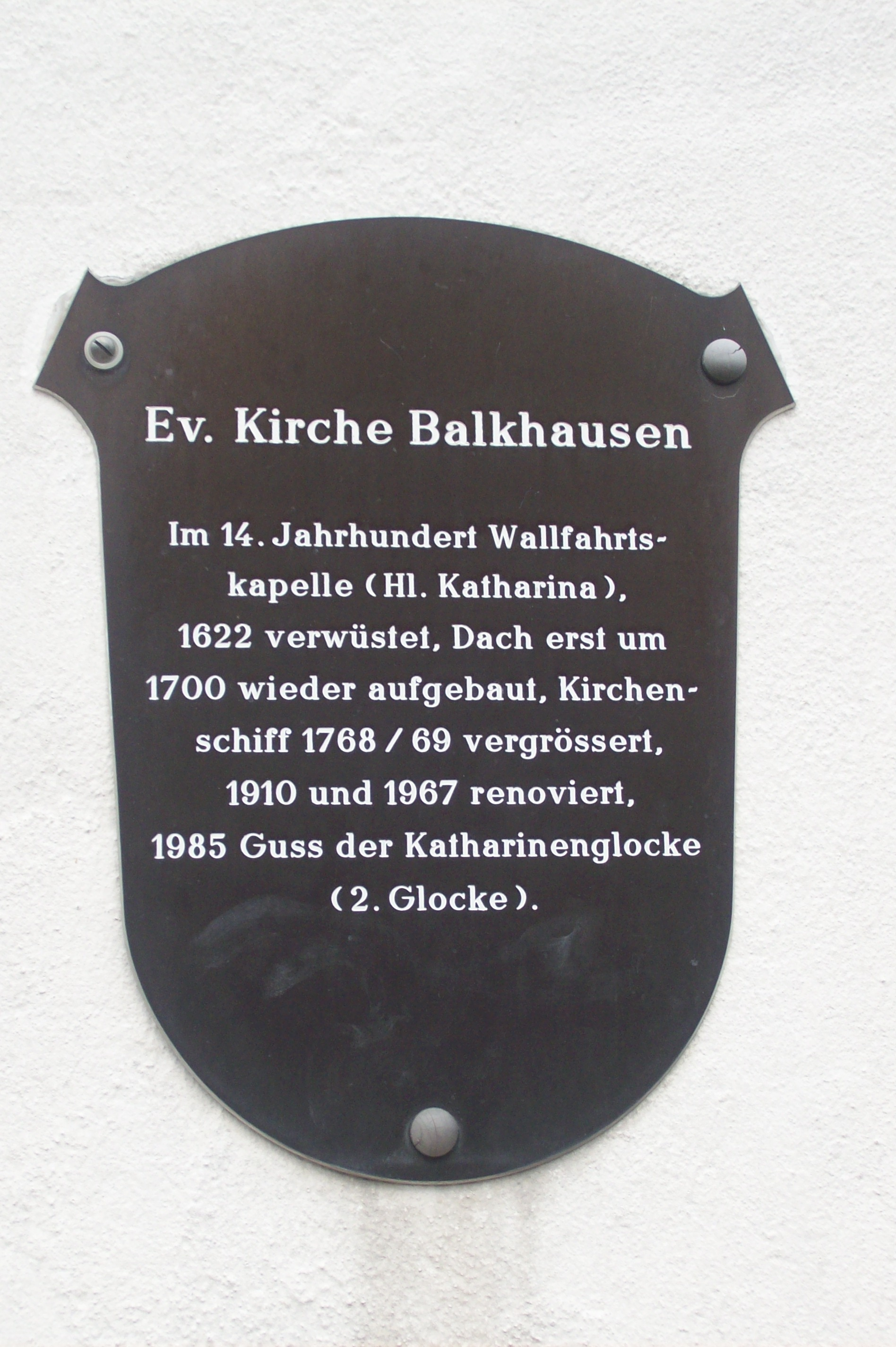 Hinweistafel an der evangelischen Kirche in Balkhausen, Seeheim-Jugenheim, Hessen, Deutschland